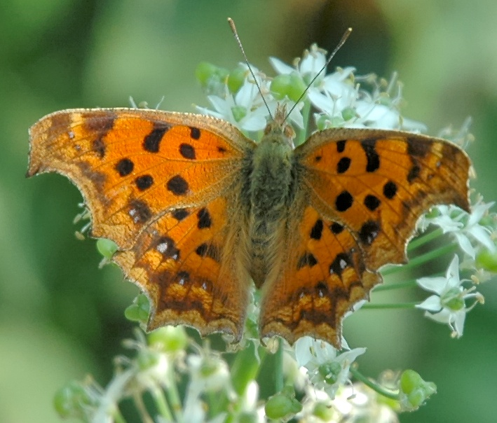 Polygonia c-aureum in Japan (キタテハ)